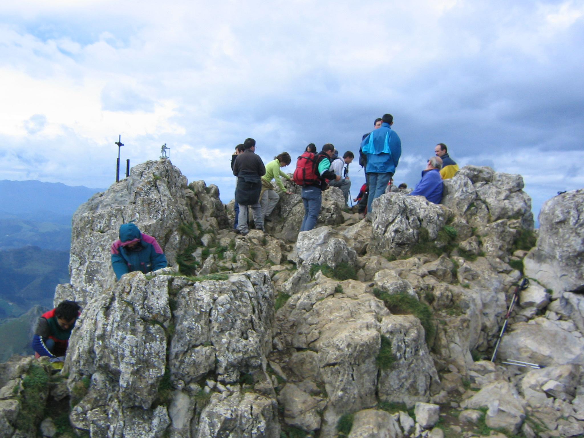 Cumbre del Txindoki, Guipúzcoa, País Vaco, España.